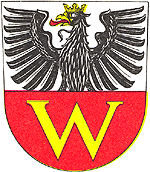 Strachotice znak